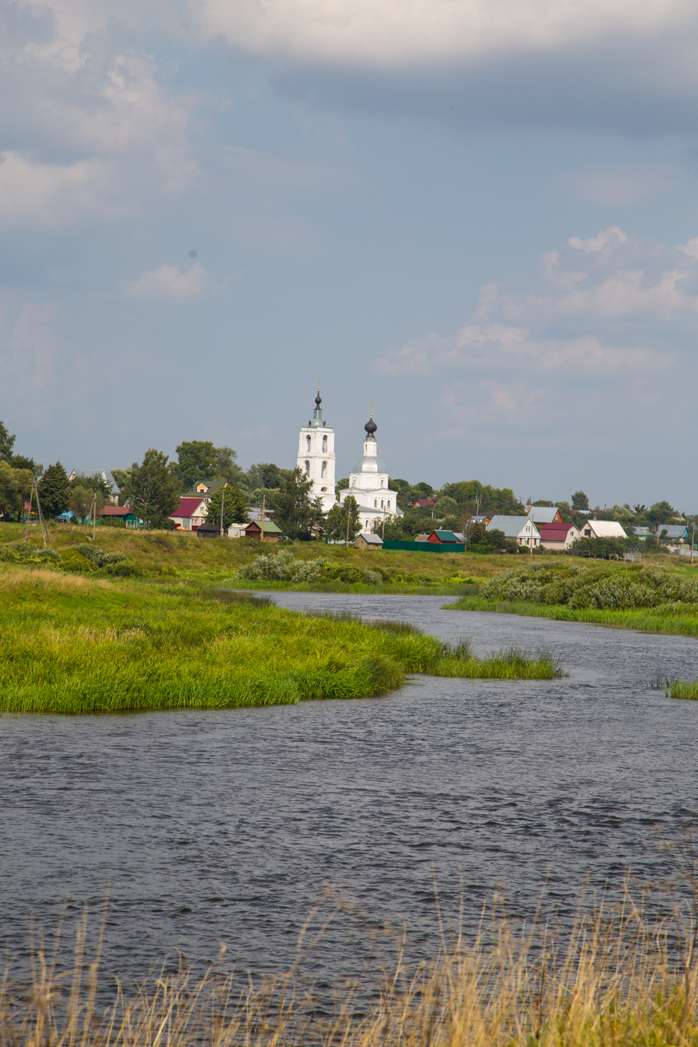 Церковь Николая Чудотворца